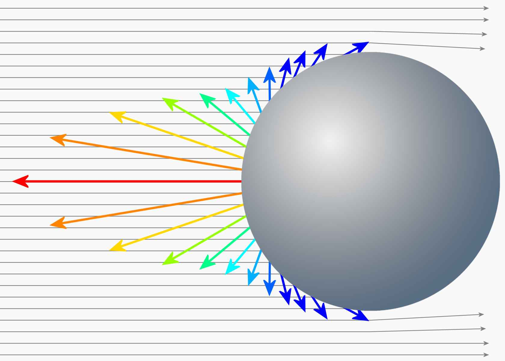 Versuch der Darstellung, welcher Anteil der Oberfläche eines kugelförmigen Reflektors bei der Retroreflexion wirksam sein kann.